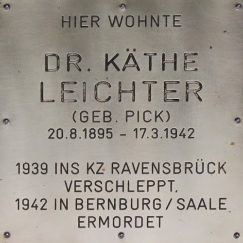 Steine der Erinnerung Wien-Liesing, Käthe Leichter, Rosenhügelstraße 245, 1230 Wien